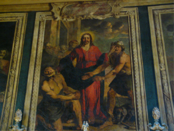 Bild von Isaac Moillon aus dem Saal Saint Hugues im Hôtel-Dieu in Beaune